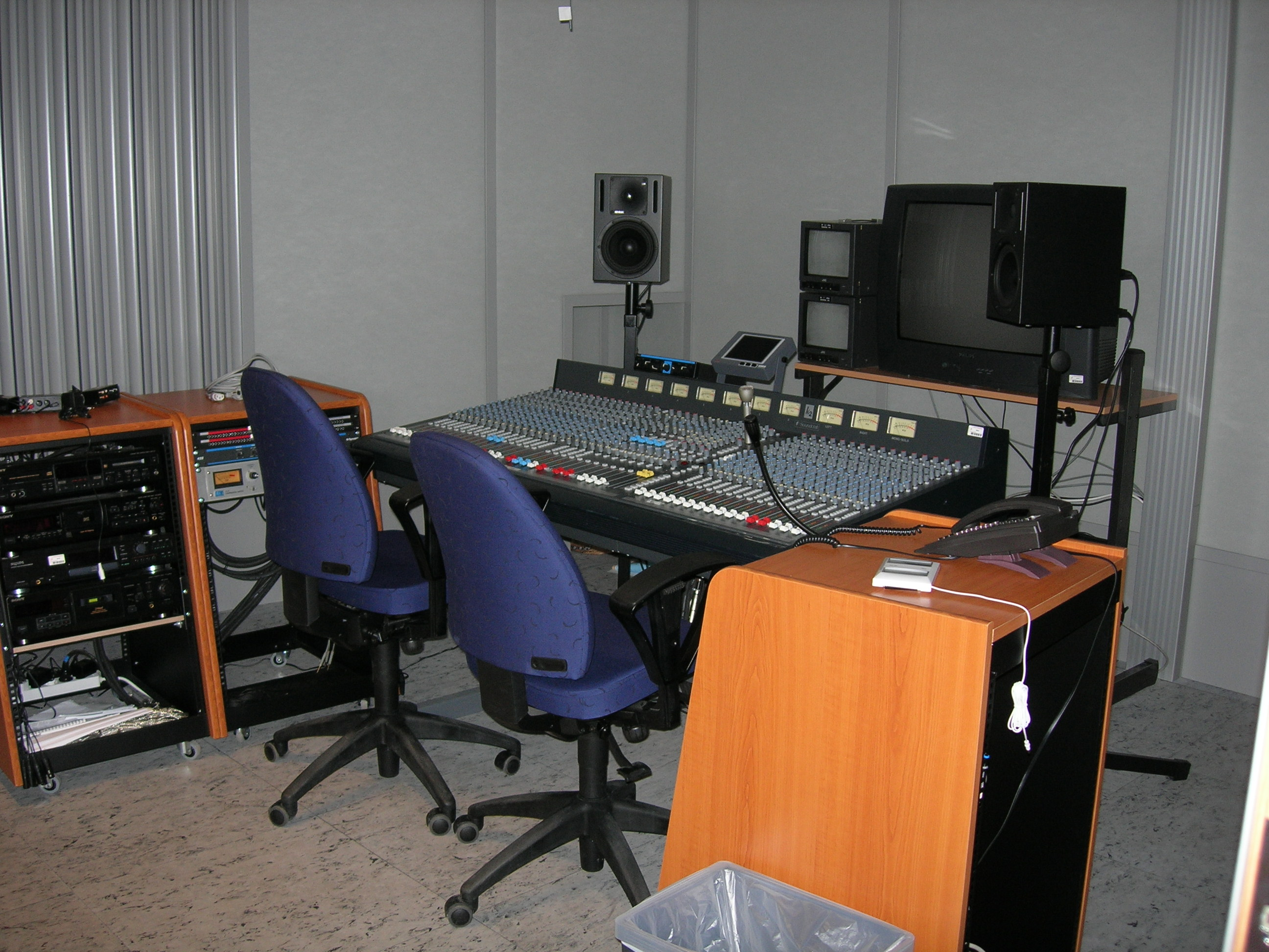 Dramatiska institutet Soundcraft K2